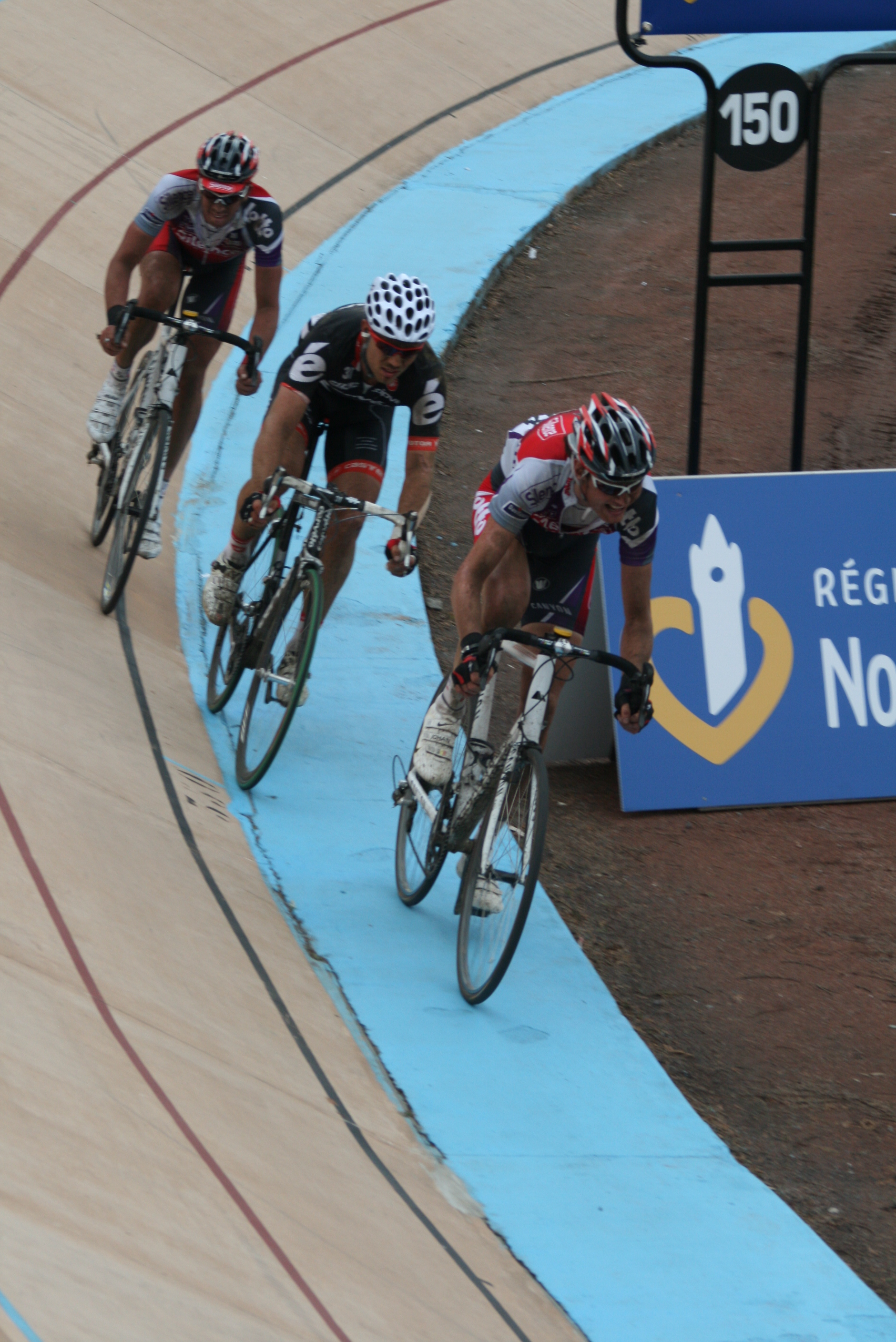 Paris-Roubaix 2009 : Johan Vansummeren, Thor Hushovd et Leif Hoste à l'arrivée à Roubaix